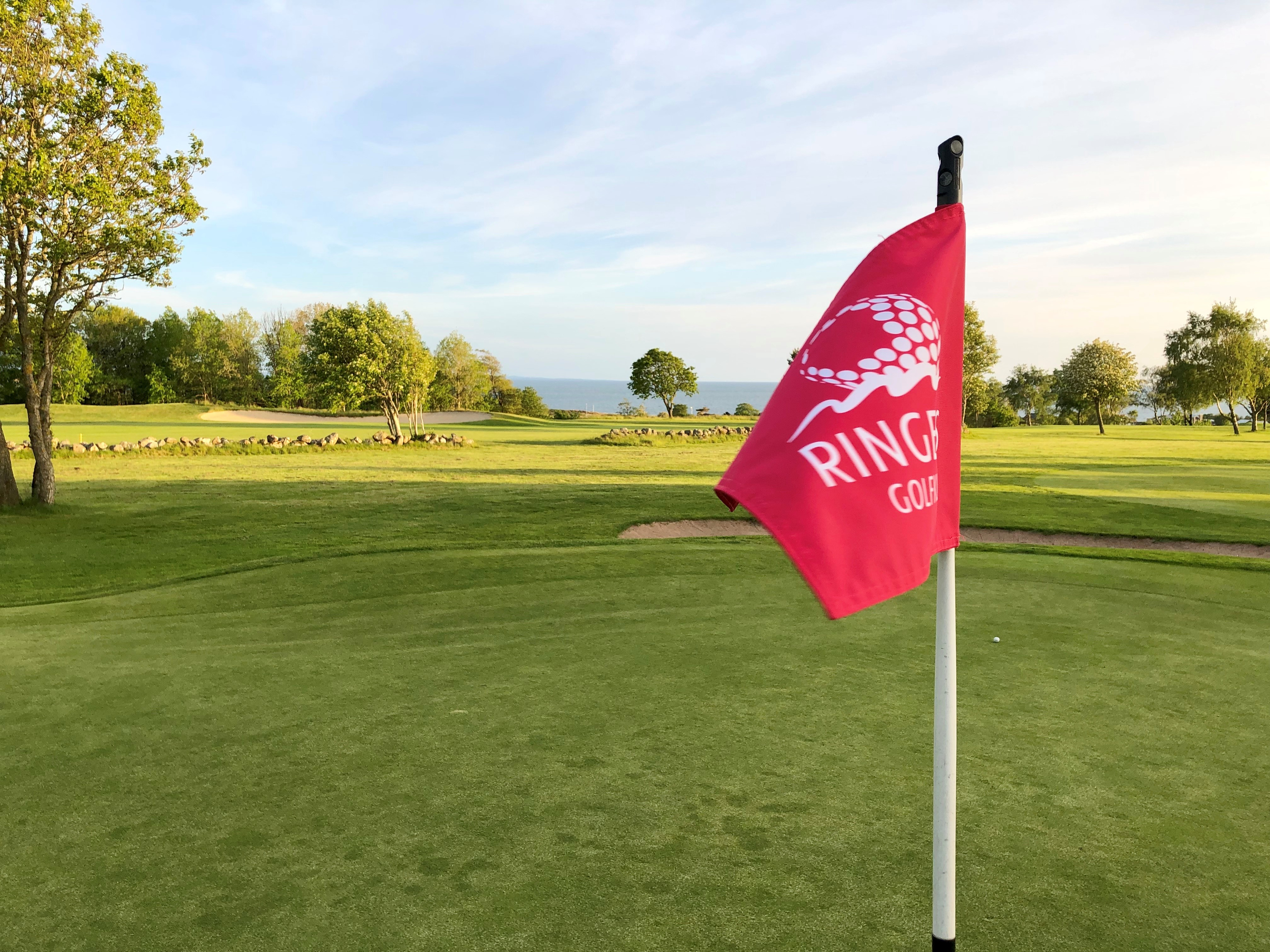 Utsikt över Kattegatt från Ringenäs GK